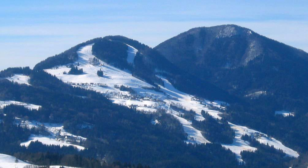 Stari vrh ski resort, Slovenia photo:Ziga 18:10, 4 February 2007 (UTC)